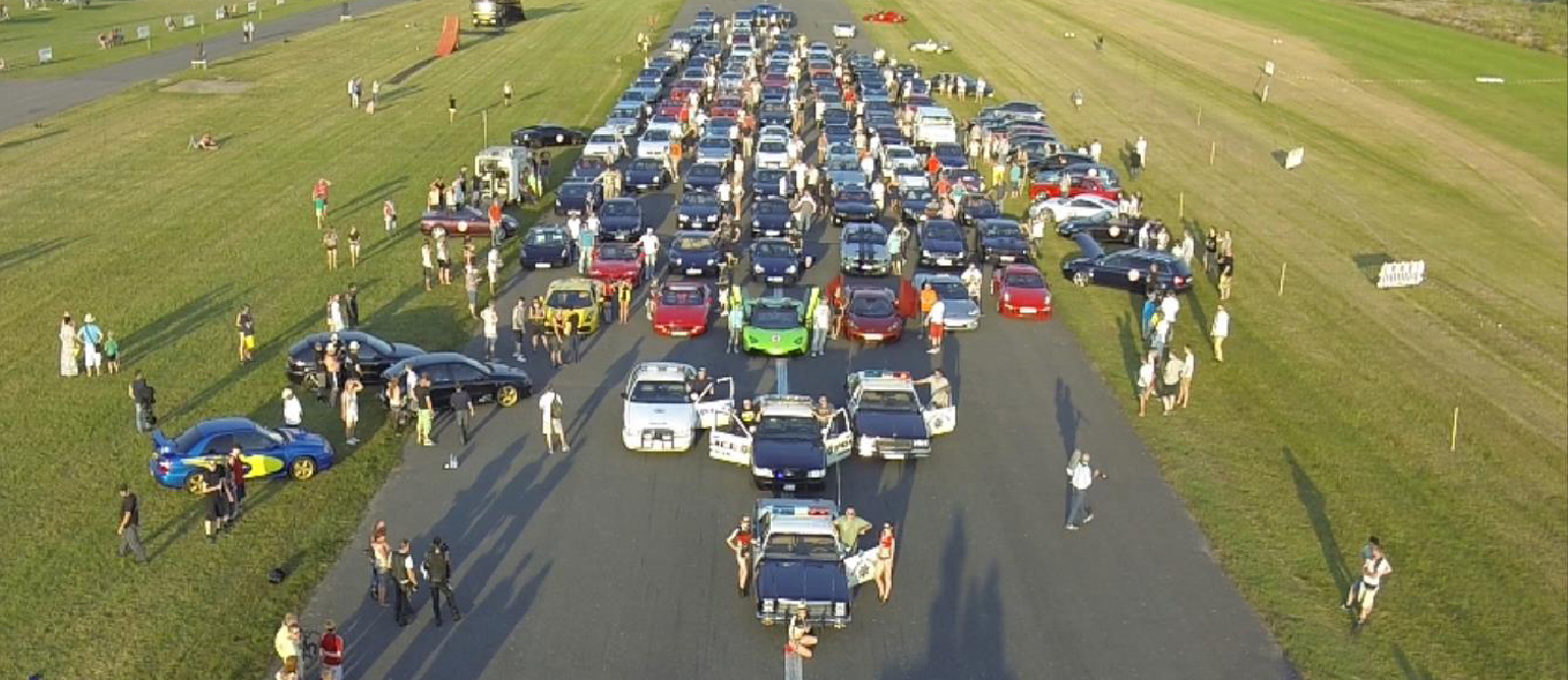 Das Teilnehmerfeld der GSR (2014) an der Endlocation am Flugplatz Damme.